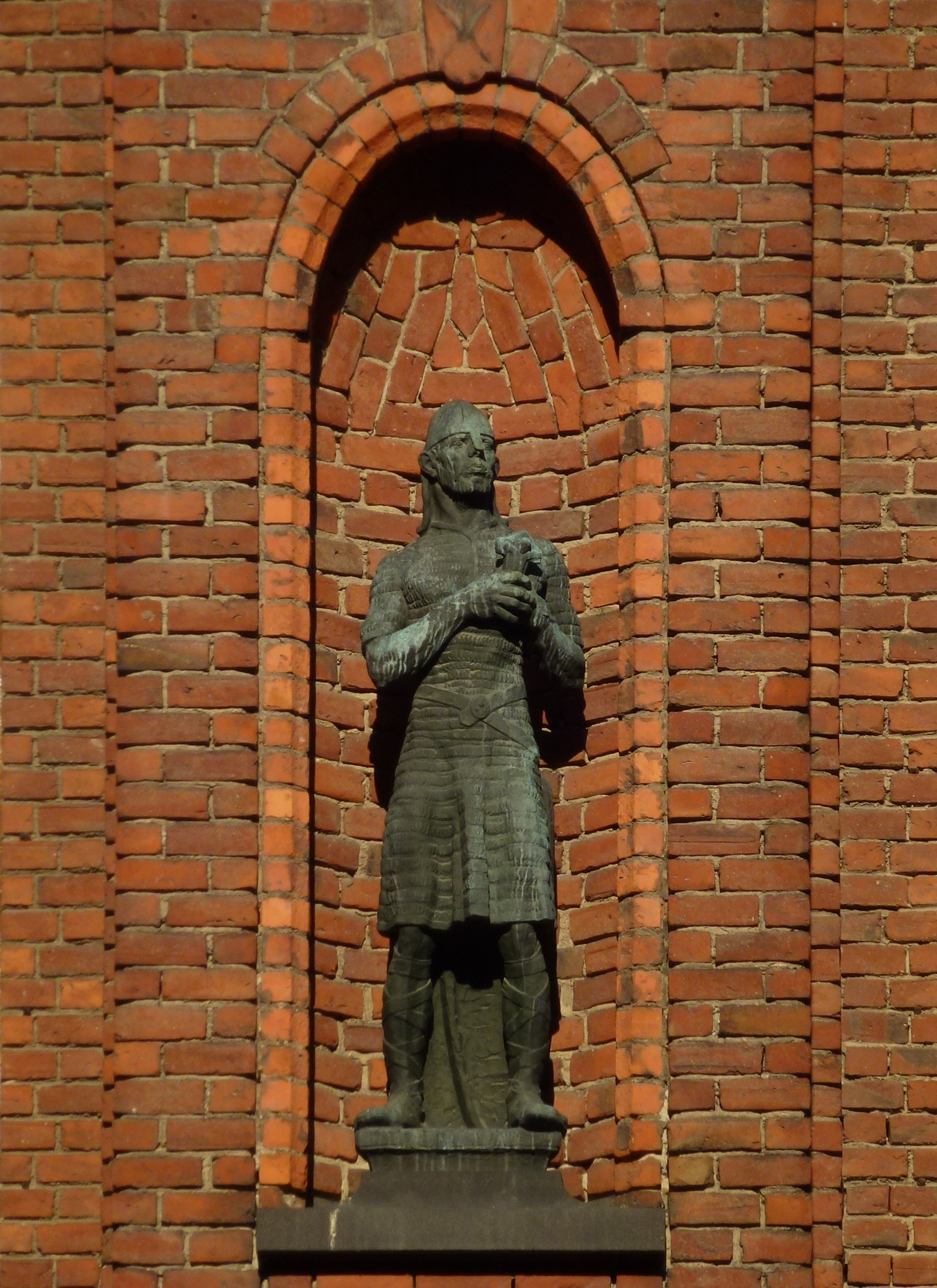 Stadshuset fasad mittpartiet med skulpturer av Ansgar Almquist: Olof Skötkonung